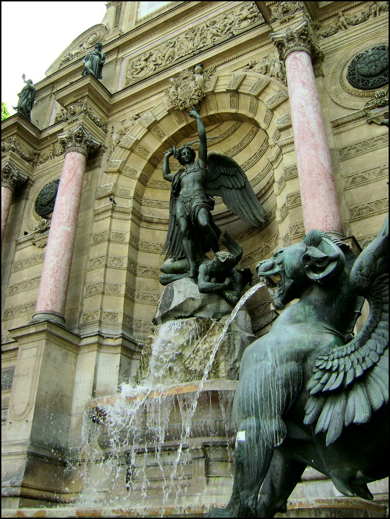 La fontaine Saint-Michel située dans le 6e arrondissement de Paris sur la place Saint-Michel, au croisement du boulevard Saint-Michel et de la rue Danton.